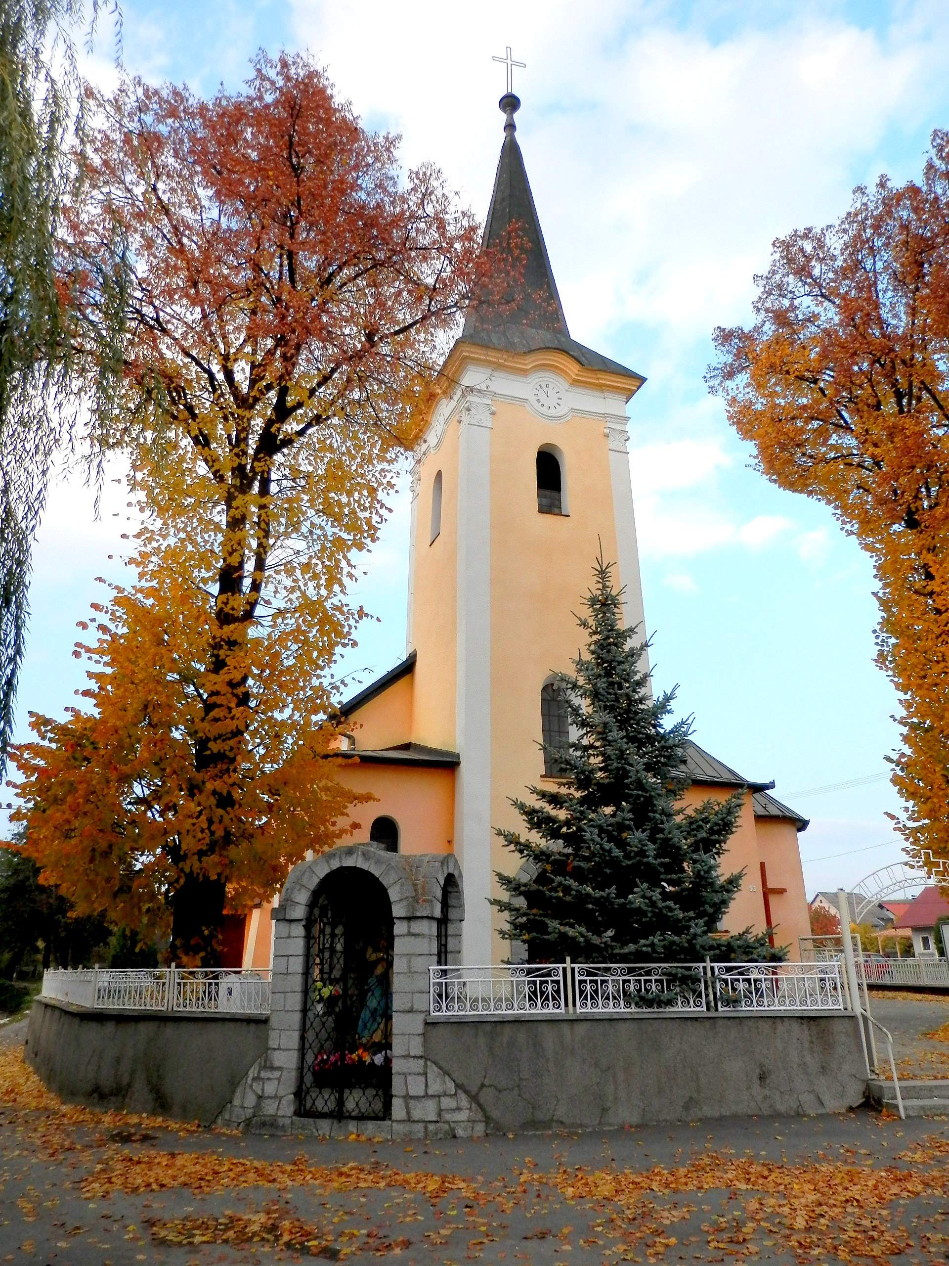 Obec Terňa, okres Prešov. Rímskokatolícky kostol, pochádza z roku 1330 a je zasvätená rovnako, ako farnosť, sv. Kataríne Alexandrijskej.